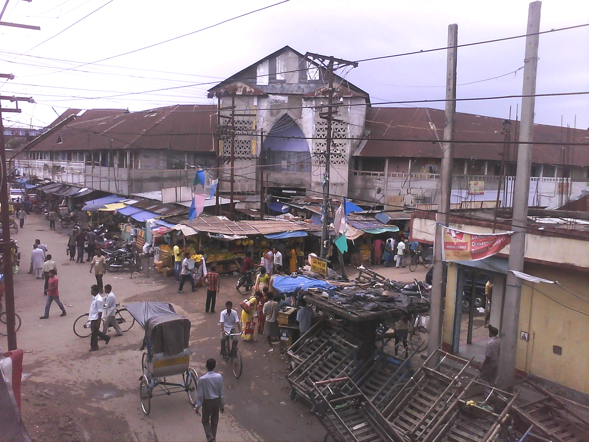 অসমীয়া: তেজপুৰৰ চক বজাৰৰ এক দৃশ্য